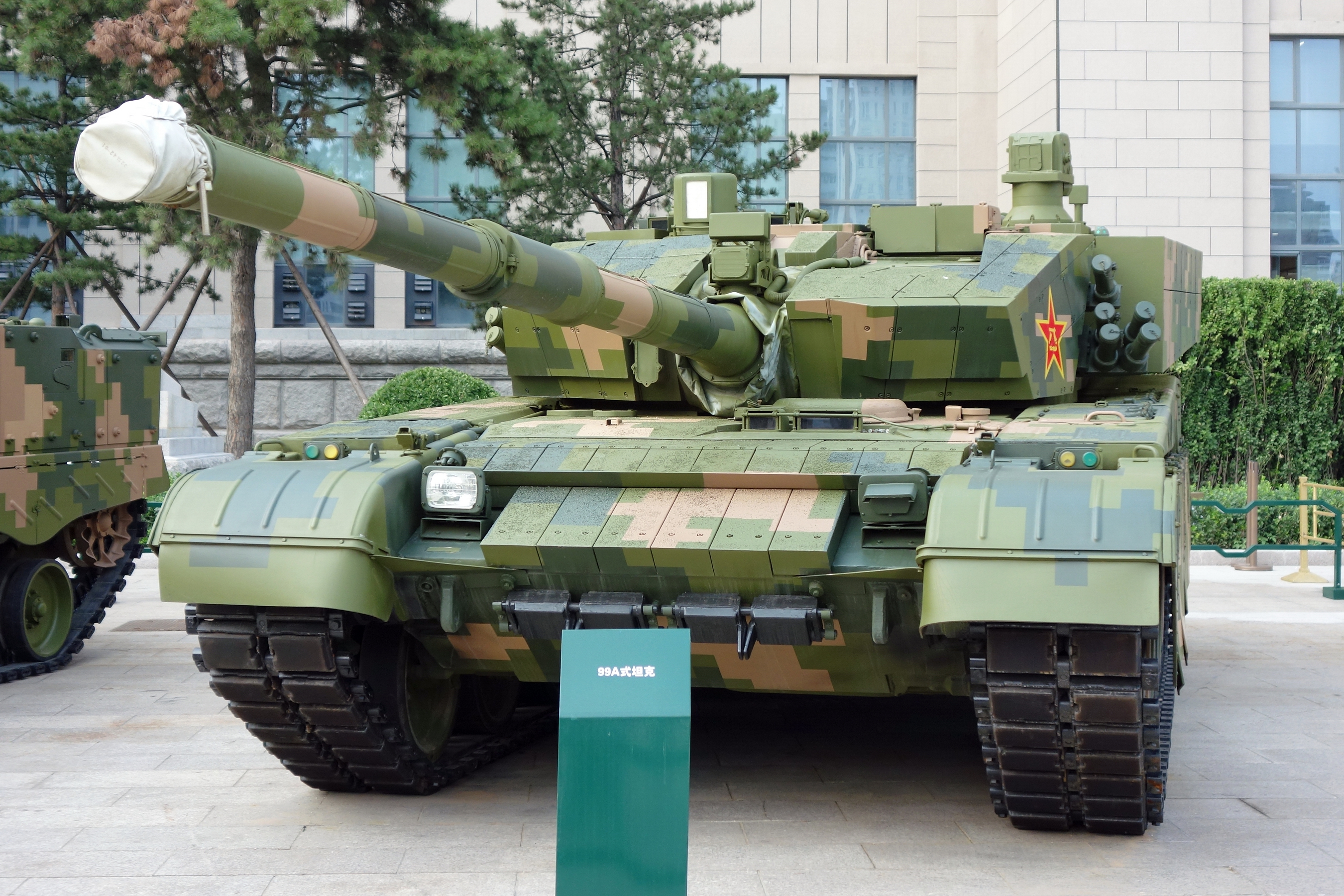 99A式坦克前视图，拍摄于中国人民革命军事博物馆“中国人民解放军建军90周年主题展览”。